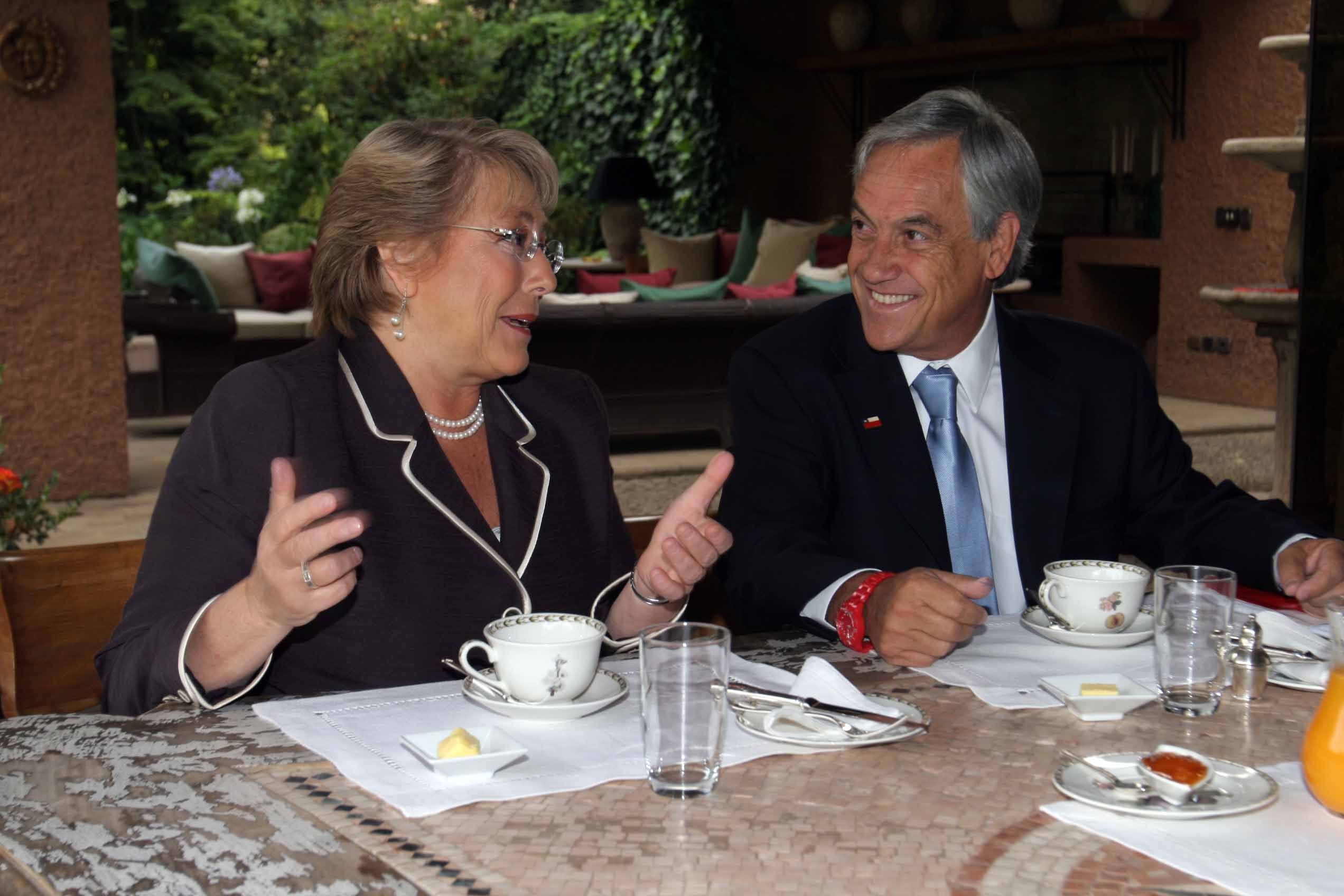 Michelle Bachelet visita a Sebastián Piñera, tras las elecciones presidenciales de 2010